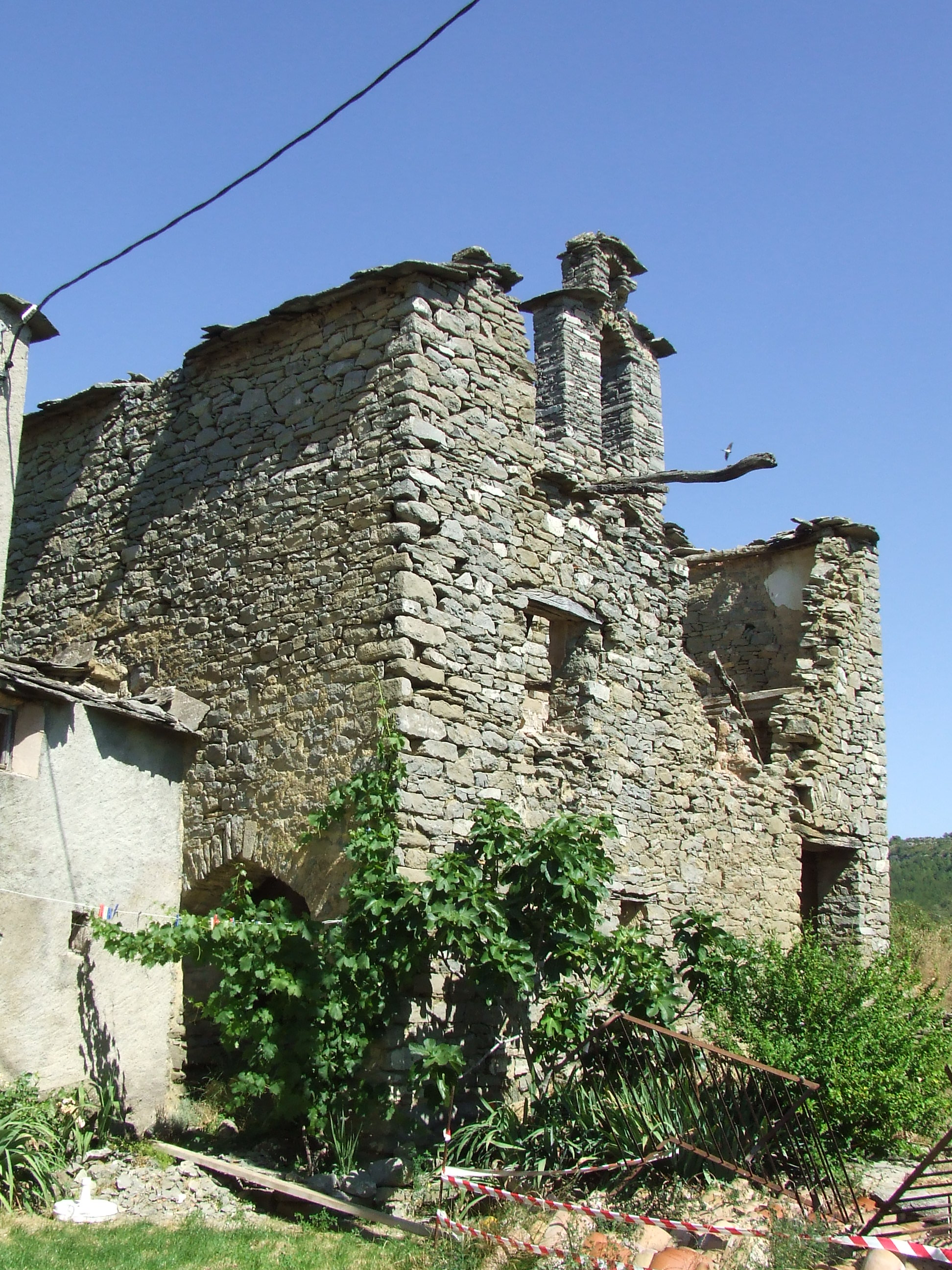 Sant Martí del Meüll (Mur, Castell de Mur, Pallars Jussà)